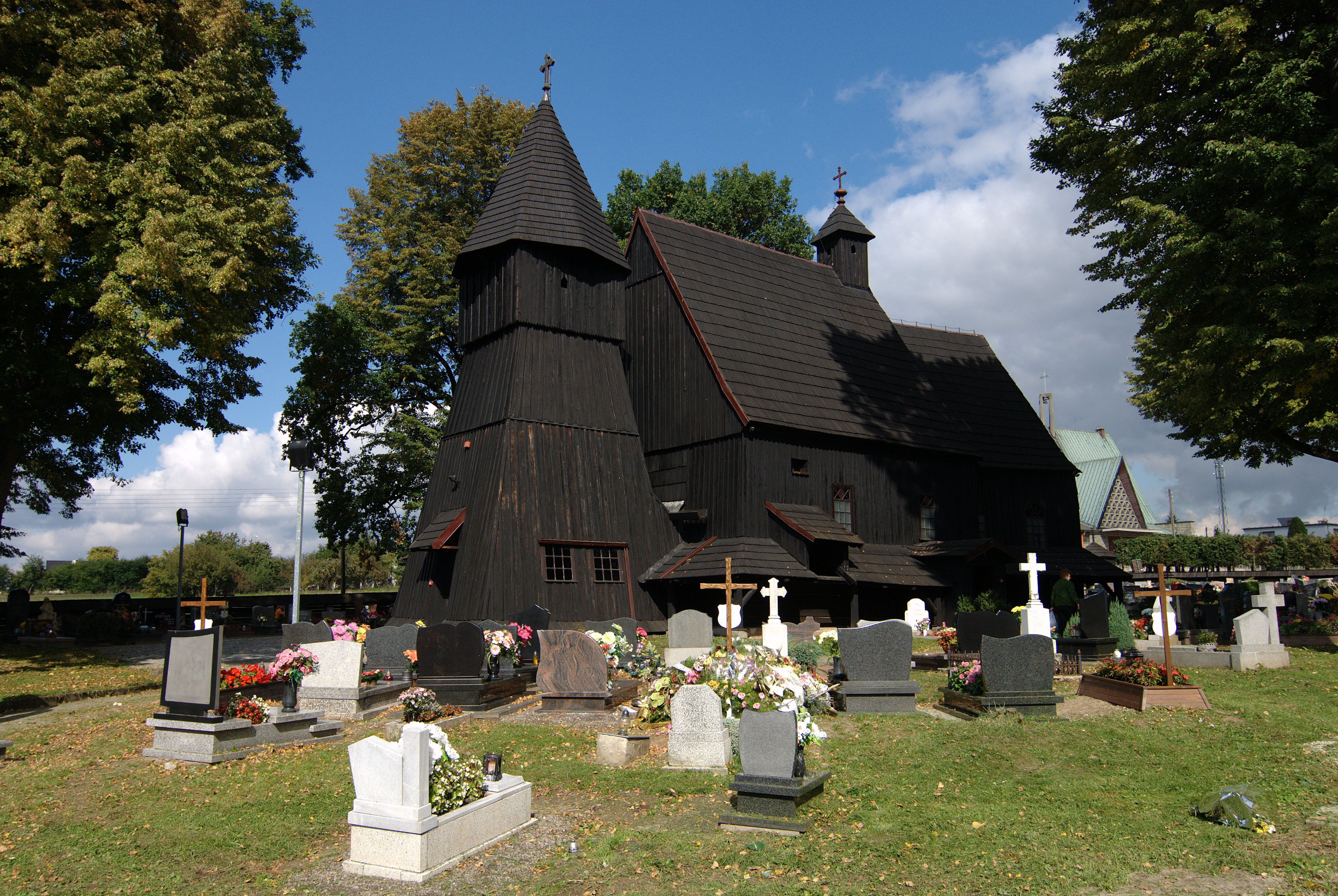 Bojszów, kościół fil. p.w. Wszystkich Świętych, XVII